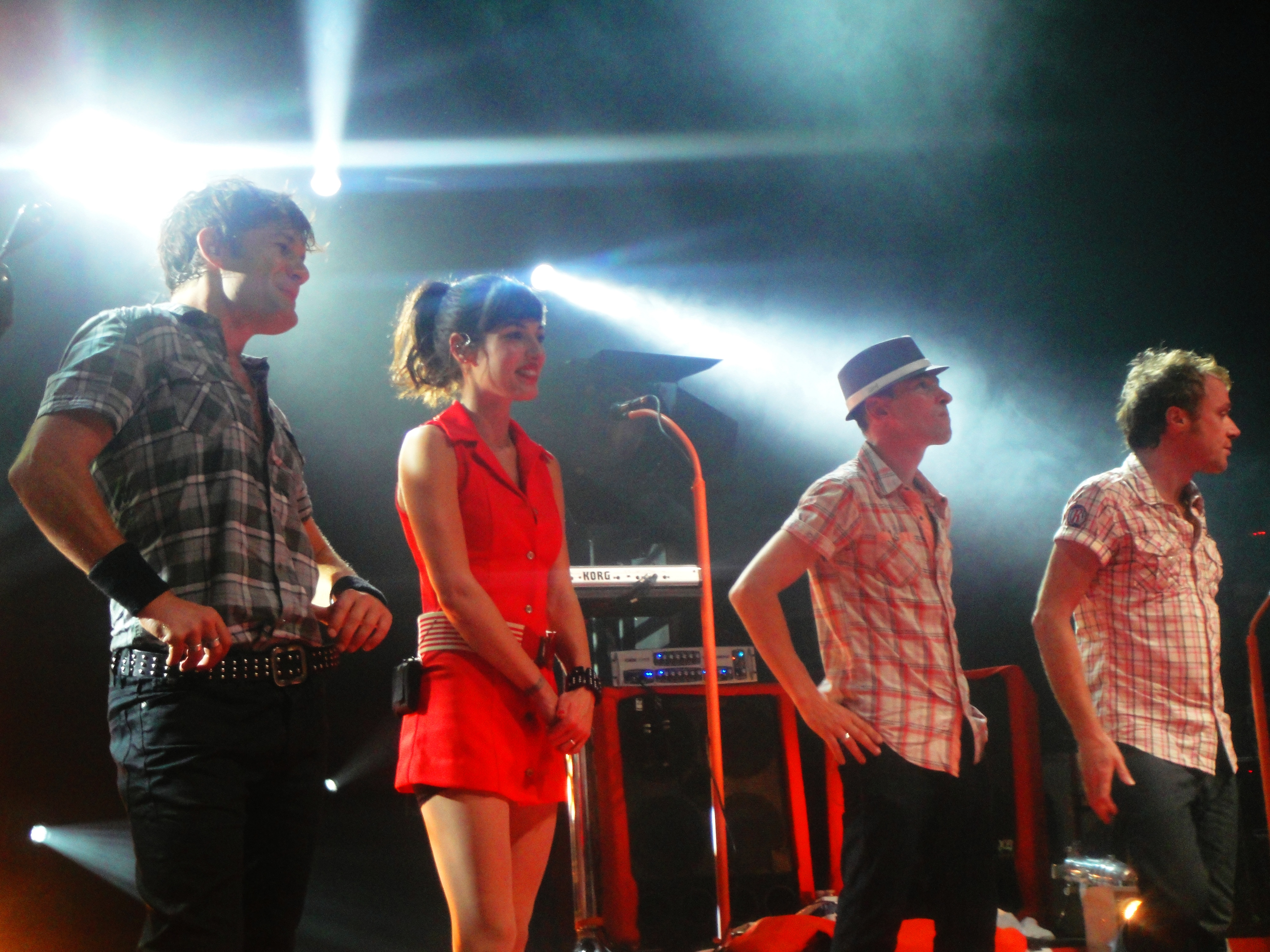 Superbus à la Cigale du 16/09/10